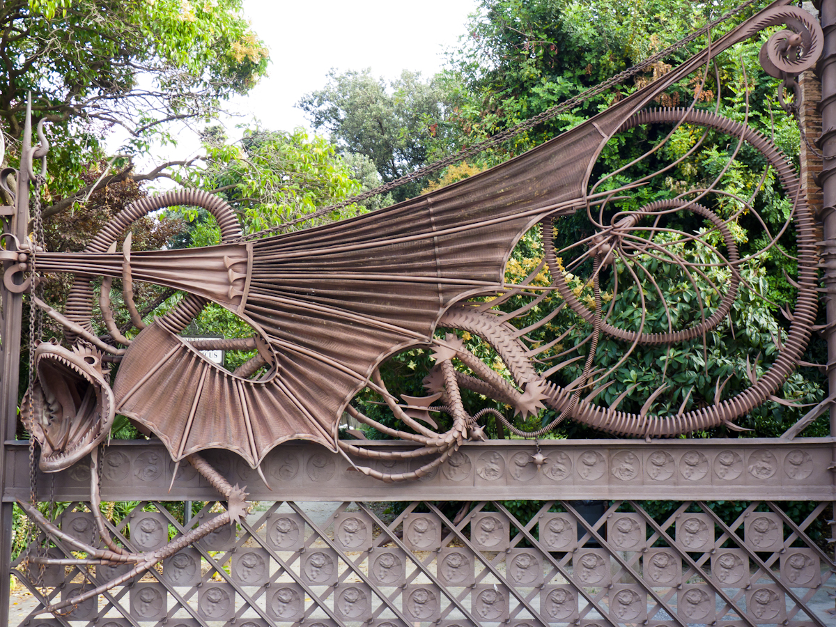 Barcelona Finca Güell 58 02 de julio de 2011